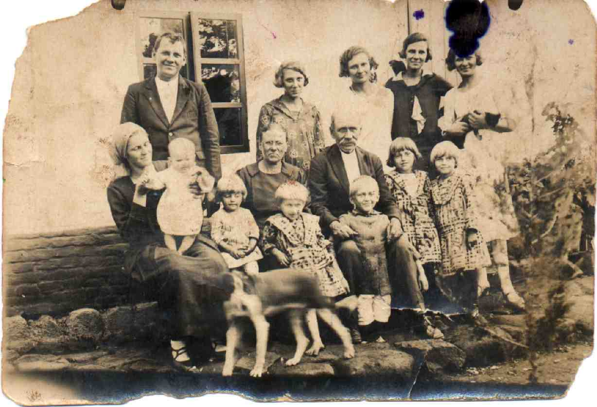 Navidad de 1925 de 3 generaciones de la Familia Czajkowski en su casa de Azara, Misiones, Argentina. Sentados al centro Mariana Sniechowska y Andreas Czajkowski. Izq. sentada Teresa Jaskolowska y de pie Juan Czajkowski (sus hijos Rafael, Celicia Helena, Juana Casimira, Casimira, Uladislada Salesia y Agnes).